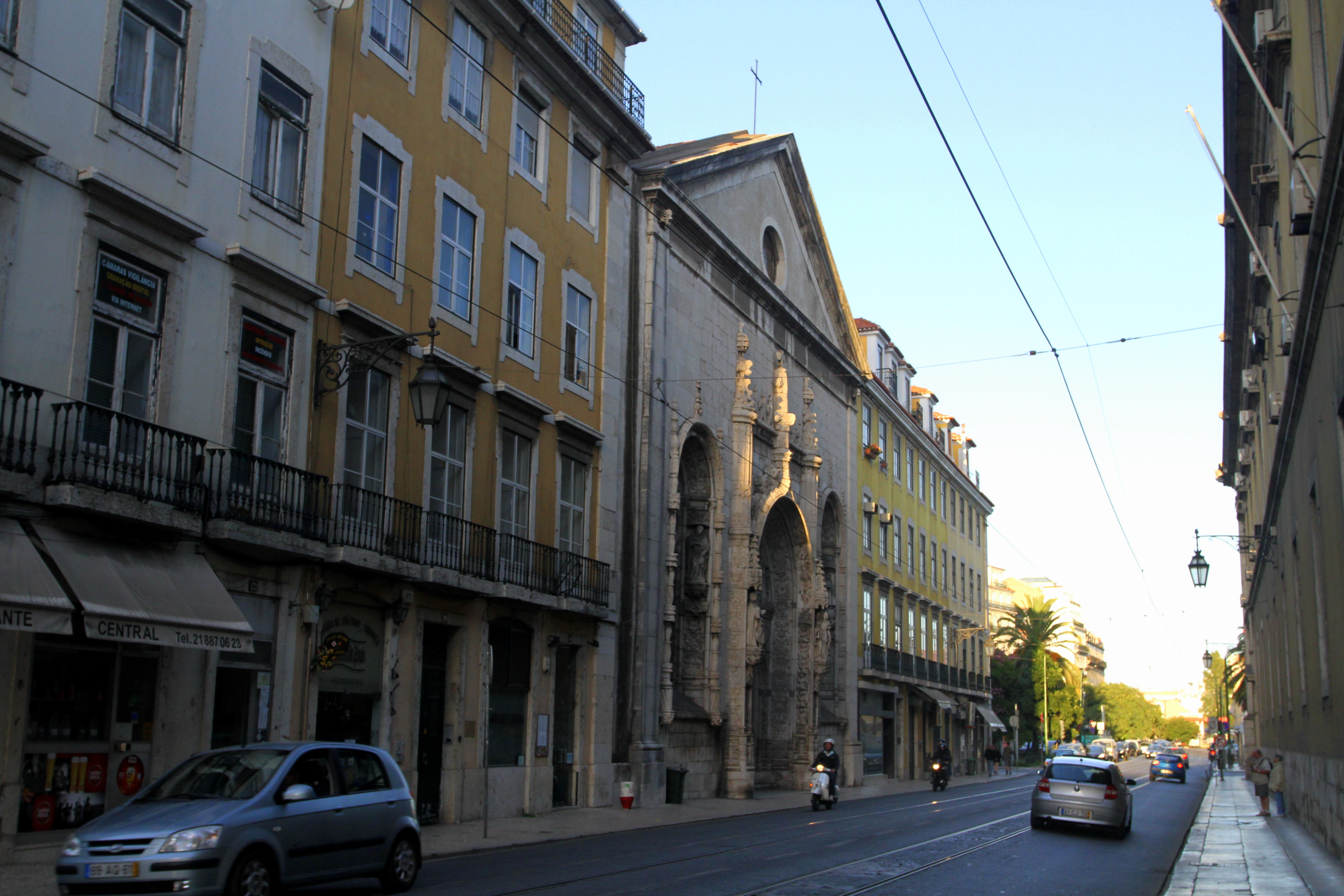 Igreja da Conceição velha - Lisboa This file was uploaded for Wiki Loves Monuments in Portugal with the unique identifier 70277.